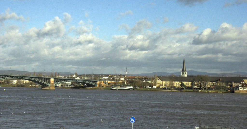 Mainz-Kastel, Stadtteil von Wiesbaden